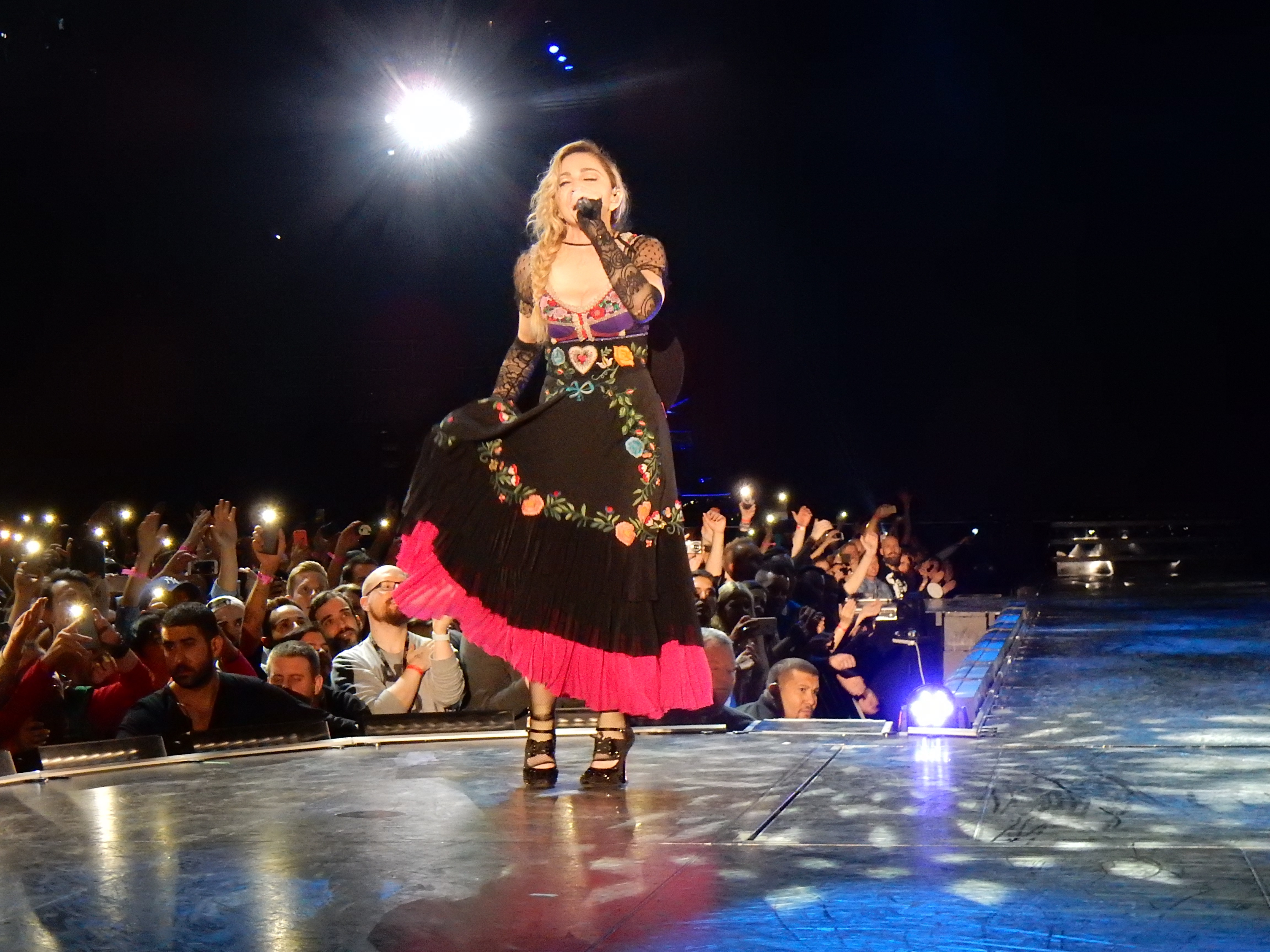 Madonna Rebel Heart Tour 2015 - Stockholm